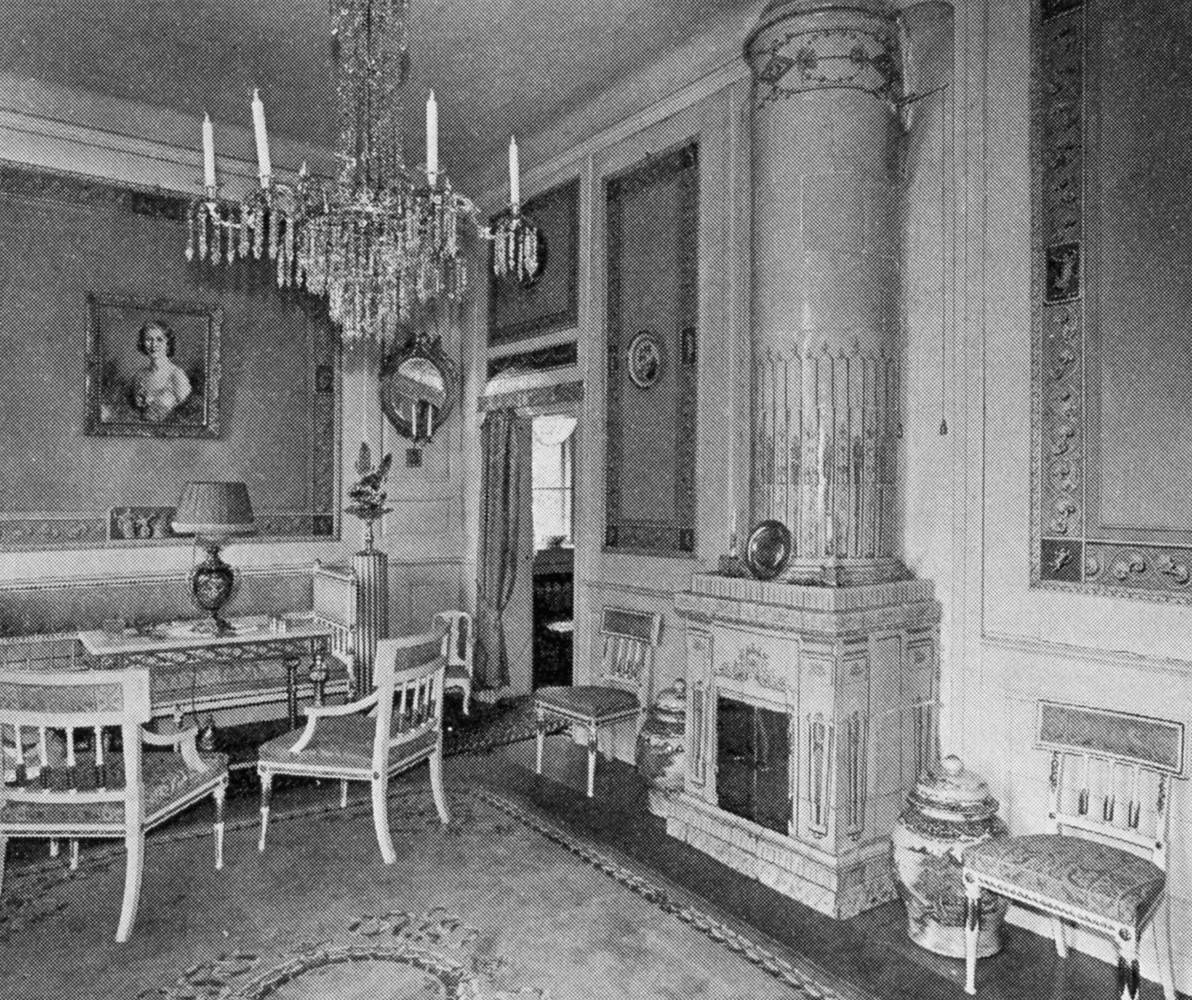 Hånö säteri, interiör